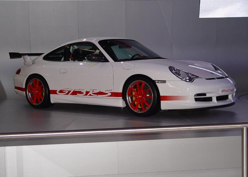 2003 Porsche 996 GT3 RS IAA Frankfurt030 Porsche 996 GT3 RS